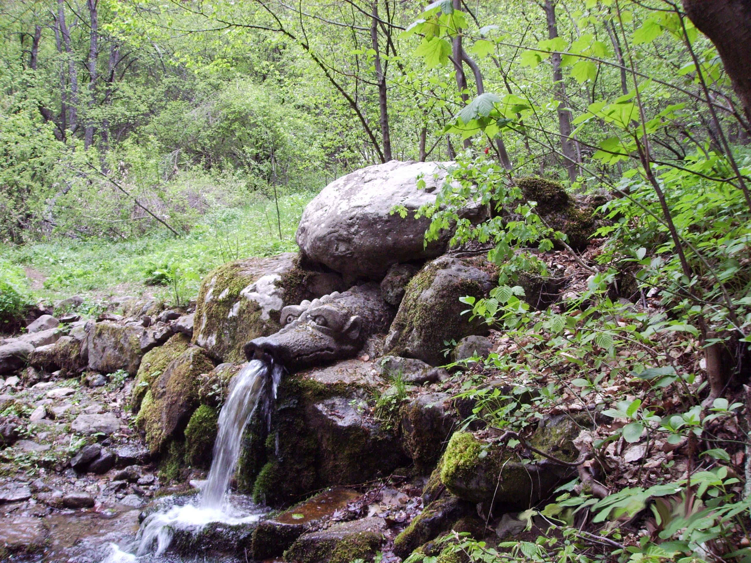 Снимка на изворd "Жива вода" край село Боснек!